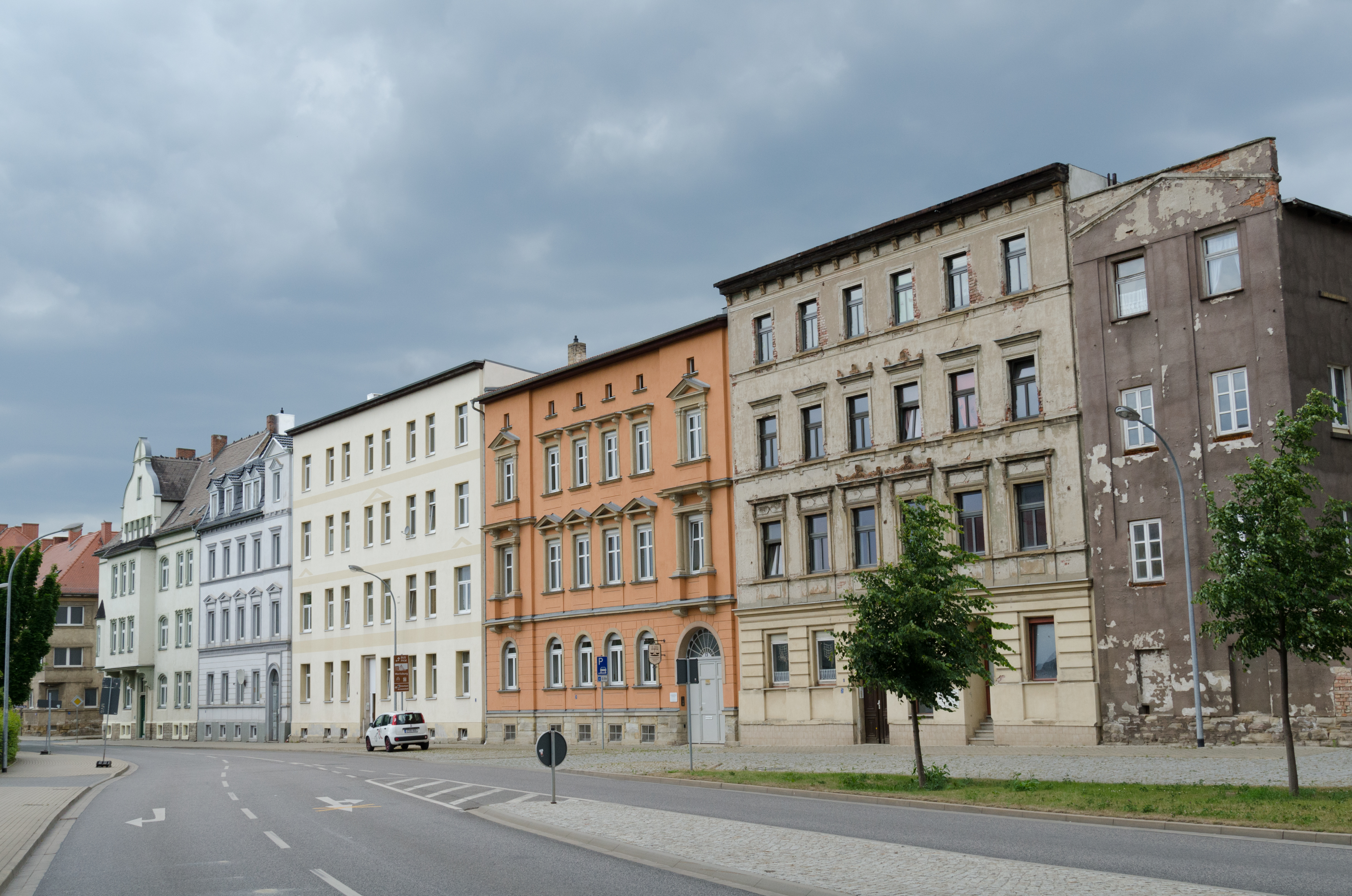 Zeitz, Albrechtstraße 10, 8, 6, 4, 2